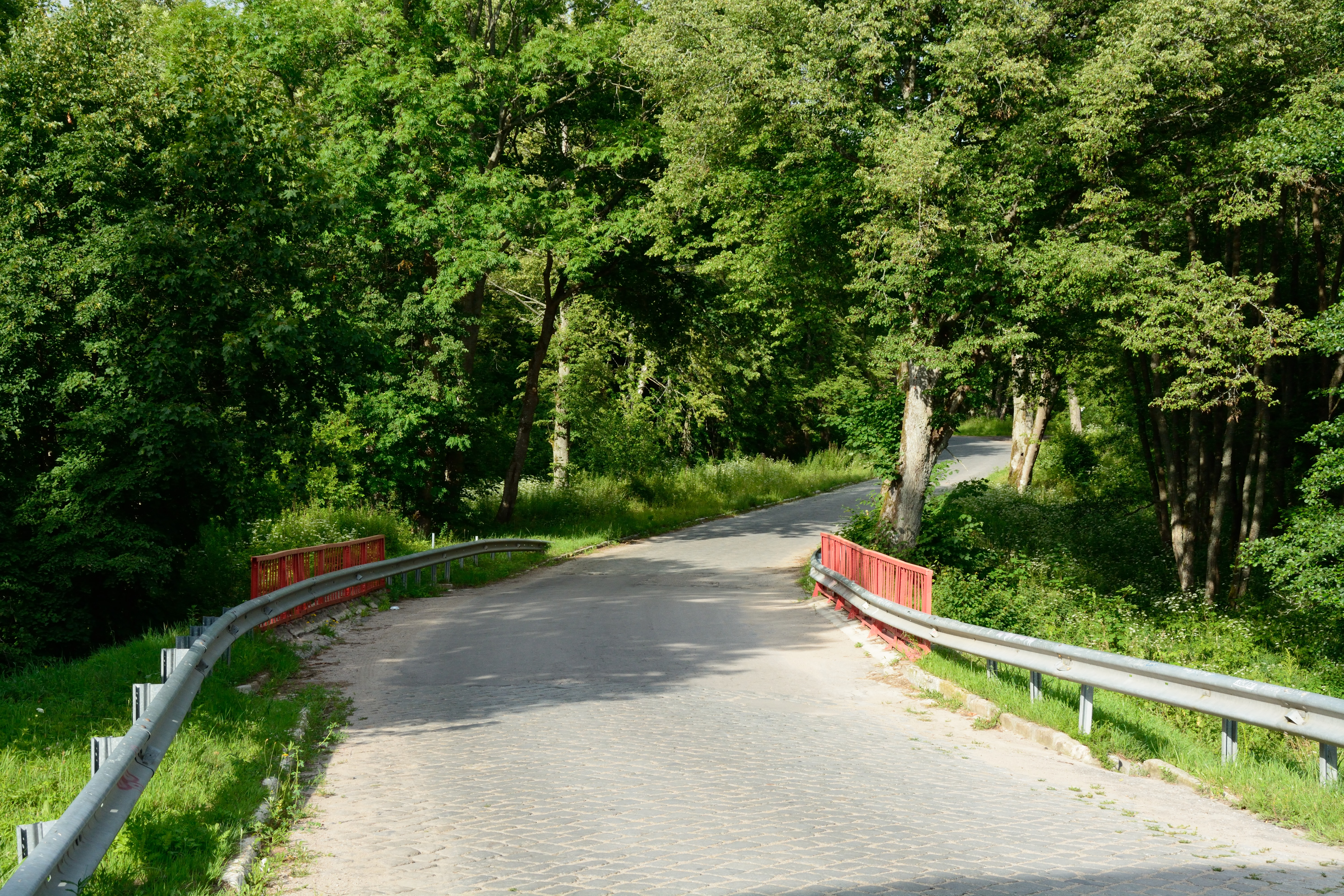 Kornevo, Kaliningradskaya oblast', Russia, 238441